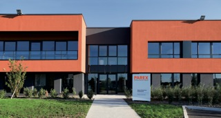 Centre de recherche Parex Group